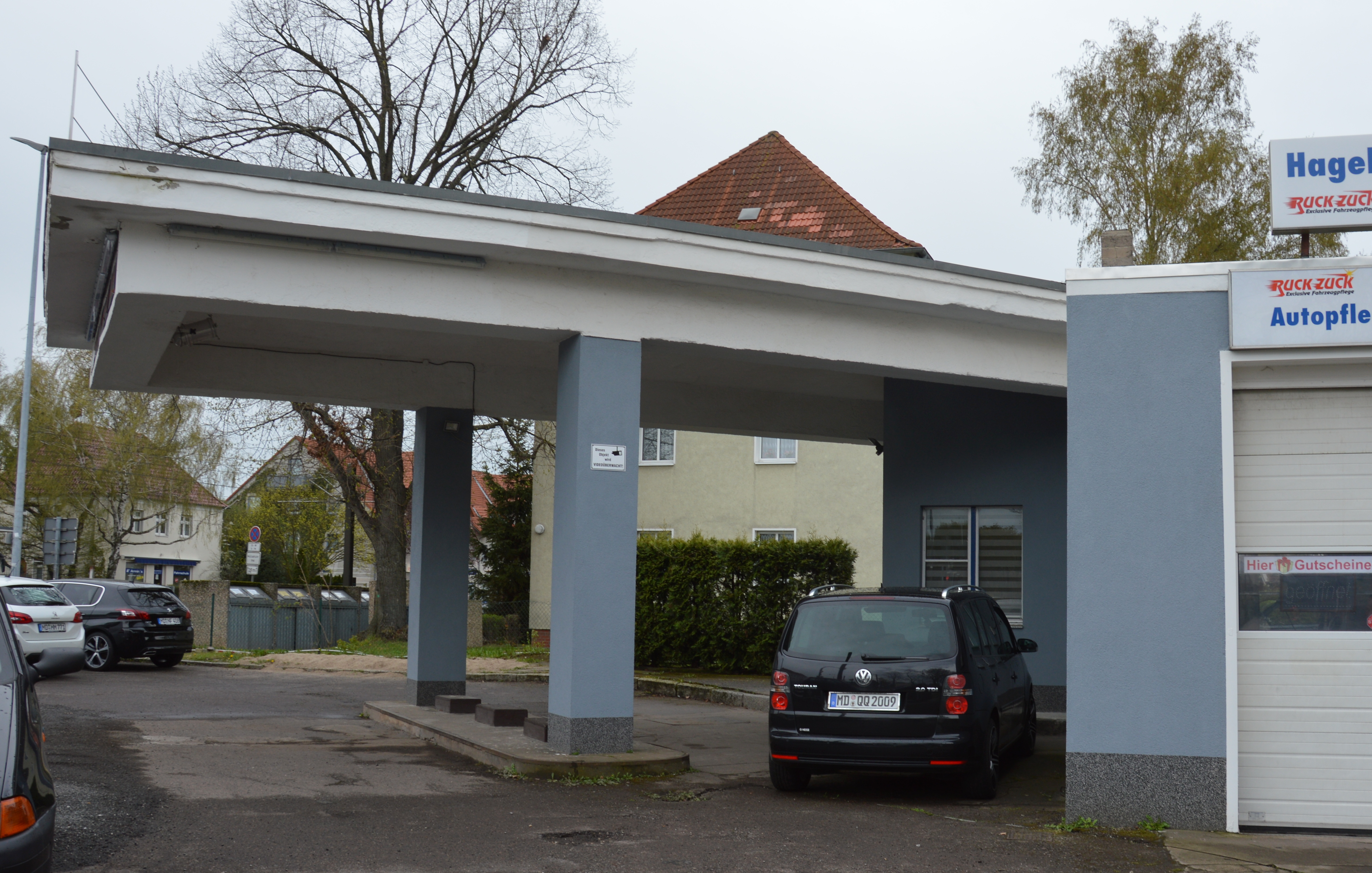 Tankstelle Kirchweg